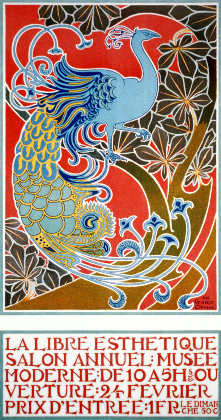 "La Libre Esthétique salon annuel: Musée Moderne, de 10 a 5 heures, ouverture: 24 Fevrier, prix d'entrée: 1 Franc, le Dimanche 50 centimes." Poster for art exhibition of the Brussels-based artistic movement at La Libre Esthétique.